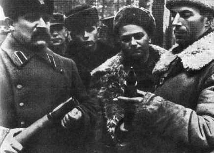 В партизанском соединении дважды Героя Советского Союза А. Ф. Федорова (слева). Д. Н. Медведев и А. А. Лукин (в центре) осматривают захваченный в бою трофей – новый немецкий снаряд.